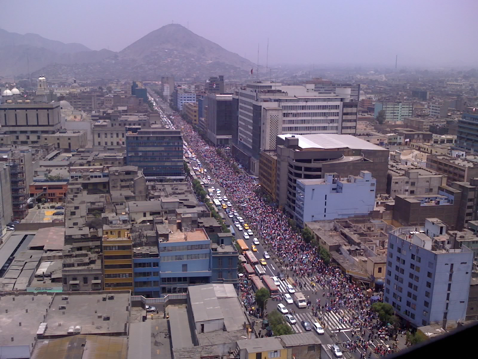 Vista de la Avenida Abancay en Lima, Perú